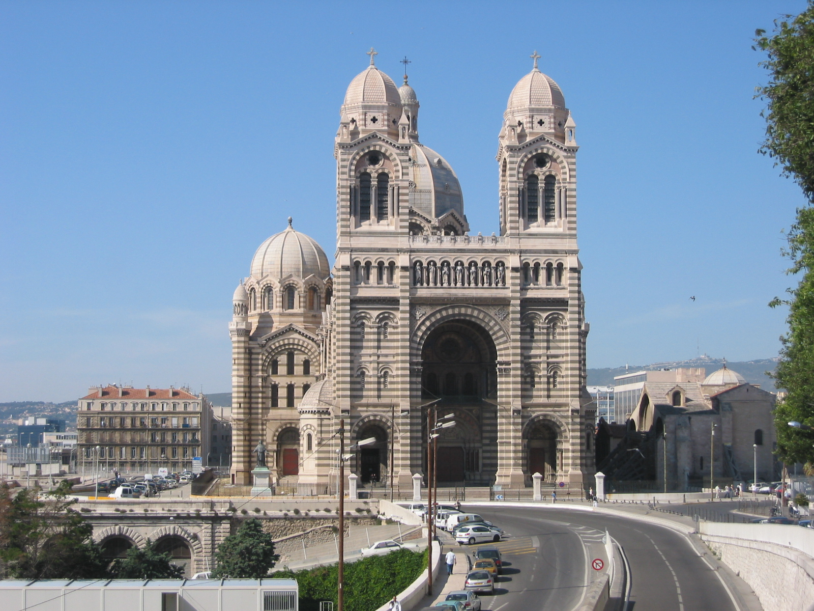 Marseille, Bouches-du-Rhône, France Cathédrale de la Major